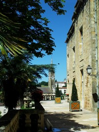 Vue sur l'Eglise depuis la Mairie